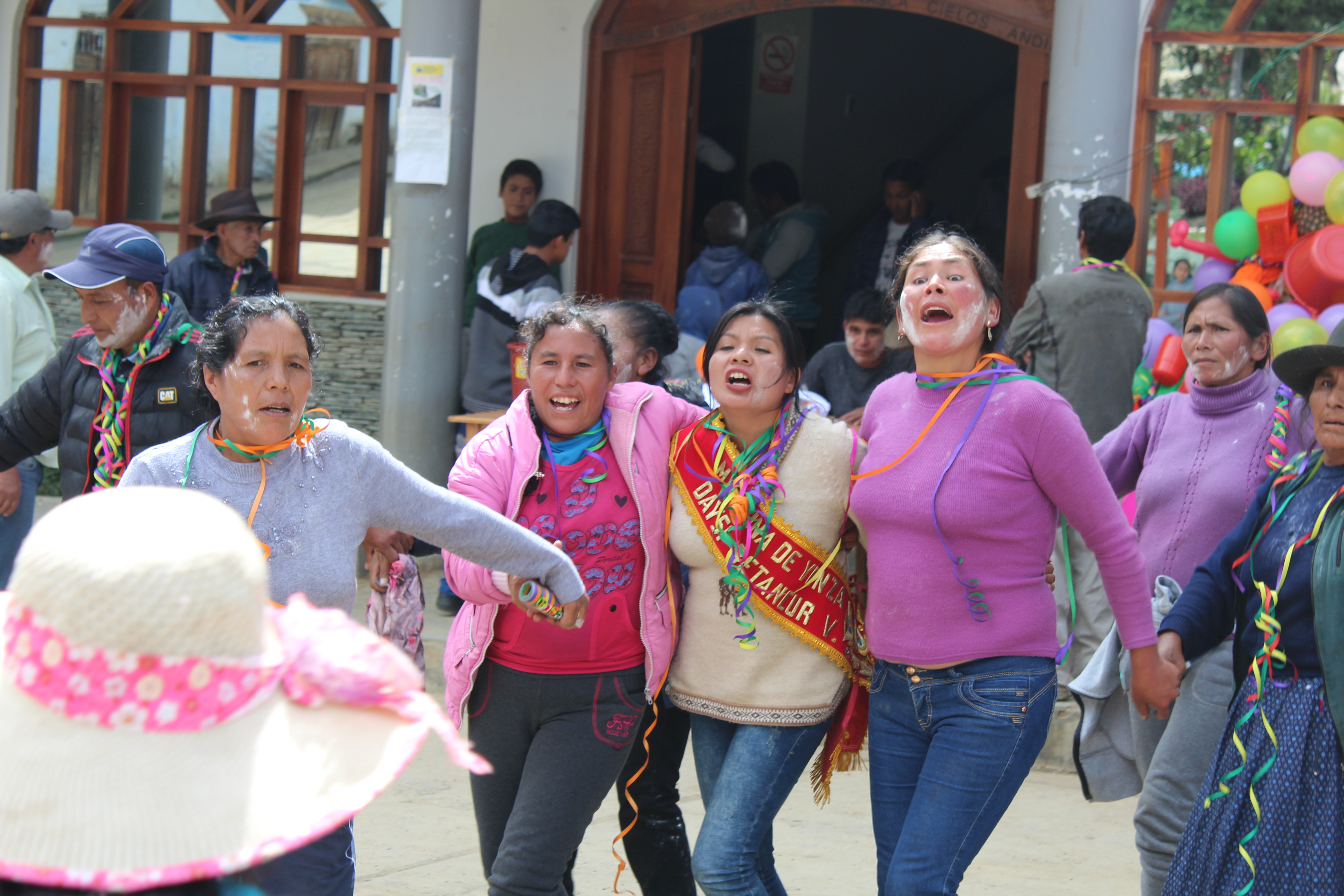 Mujeres celebrando los carnavales.